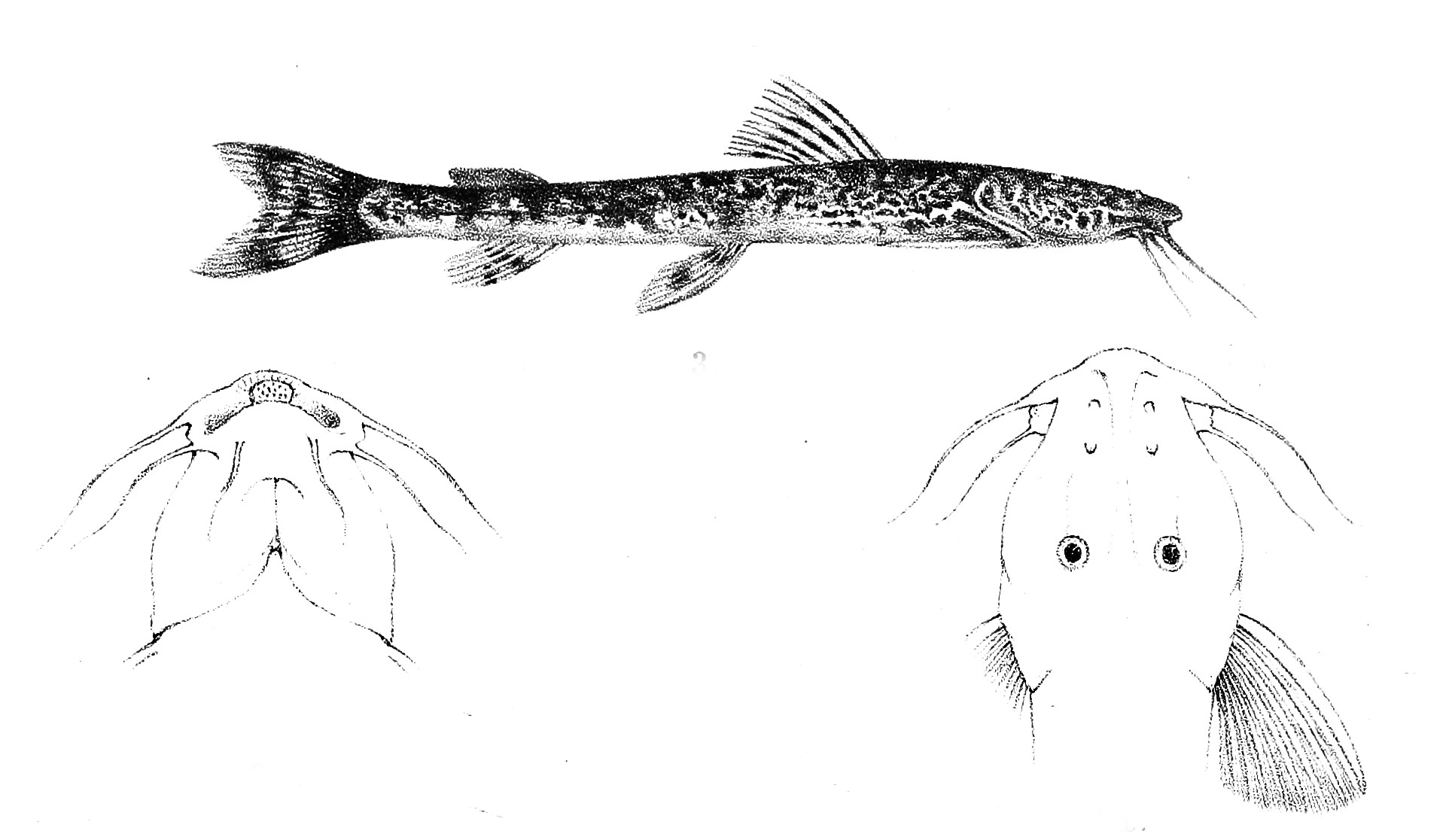 Amphilius longirostris